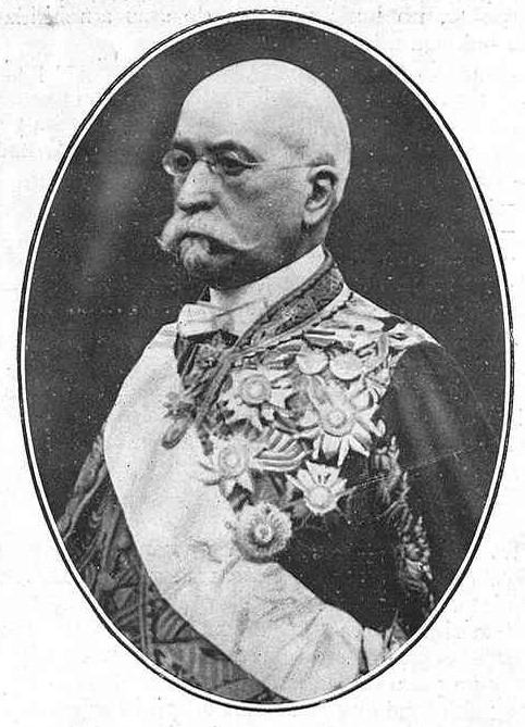 Excmo. Sr. Marqués de Aguilar de Campoo, exministro de Estado fallecido en Madrid el día 22 de febrero último.